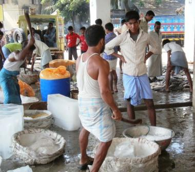 মাছ সংরক্খণের জন্য বরফের চাঁই ভাঙ্গা হচেছ। কক্সবাজার, ২০১০